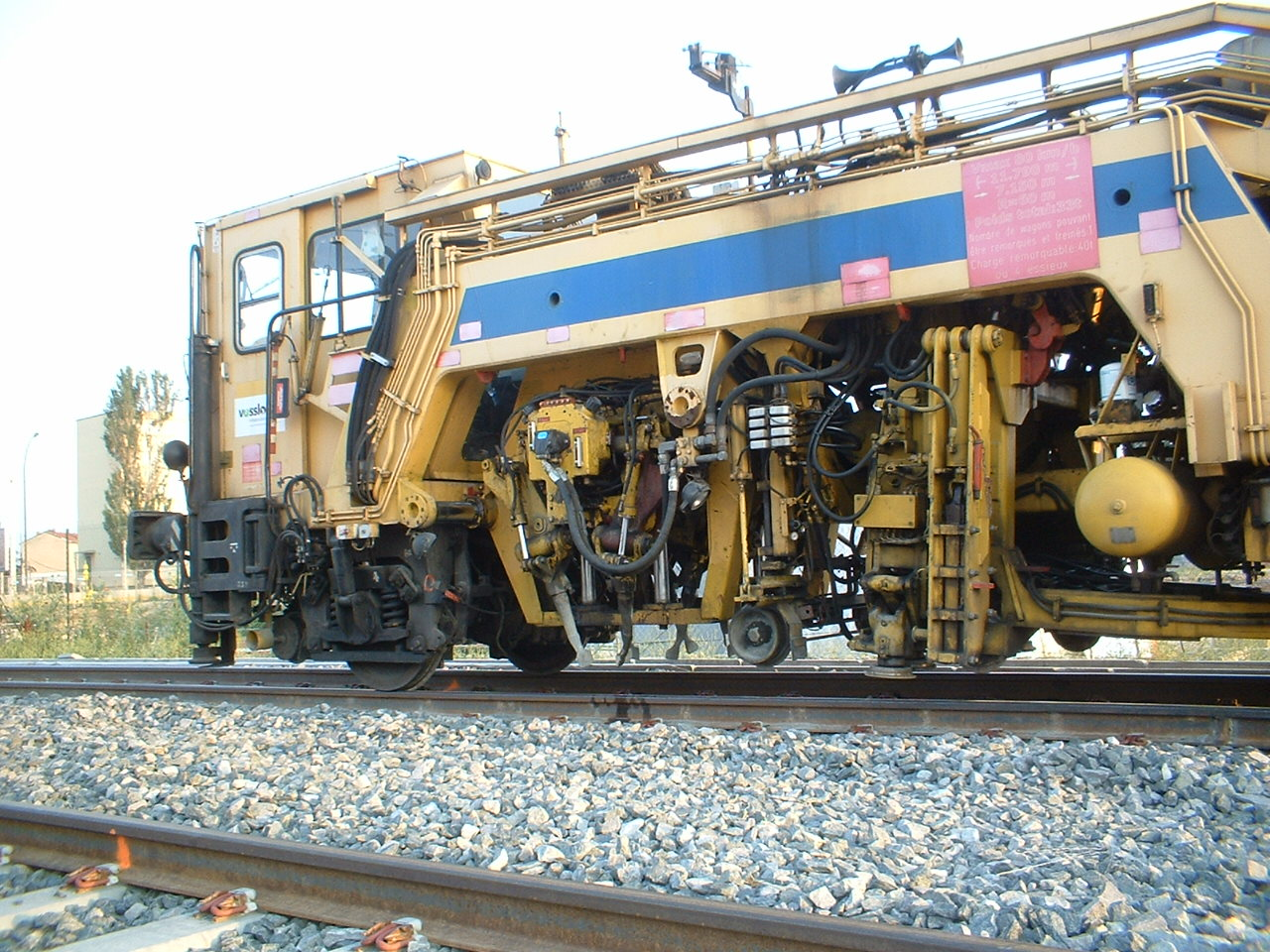 Détail, bourreuse, sur chantier LEA à Lyon